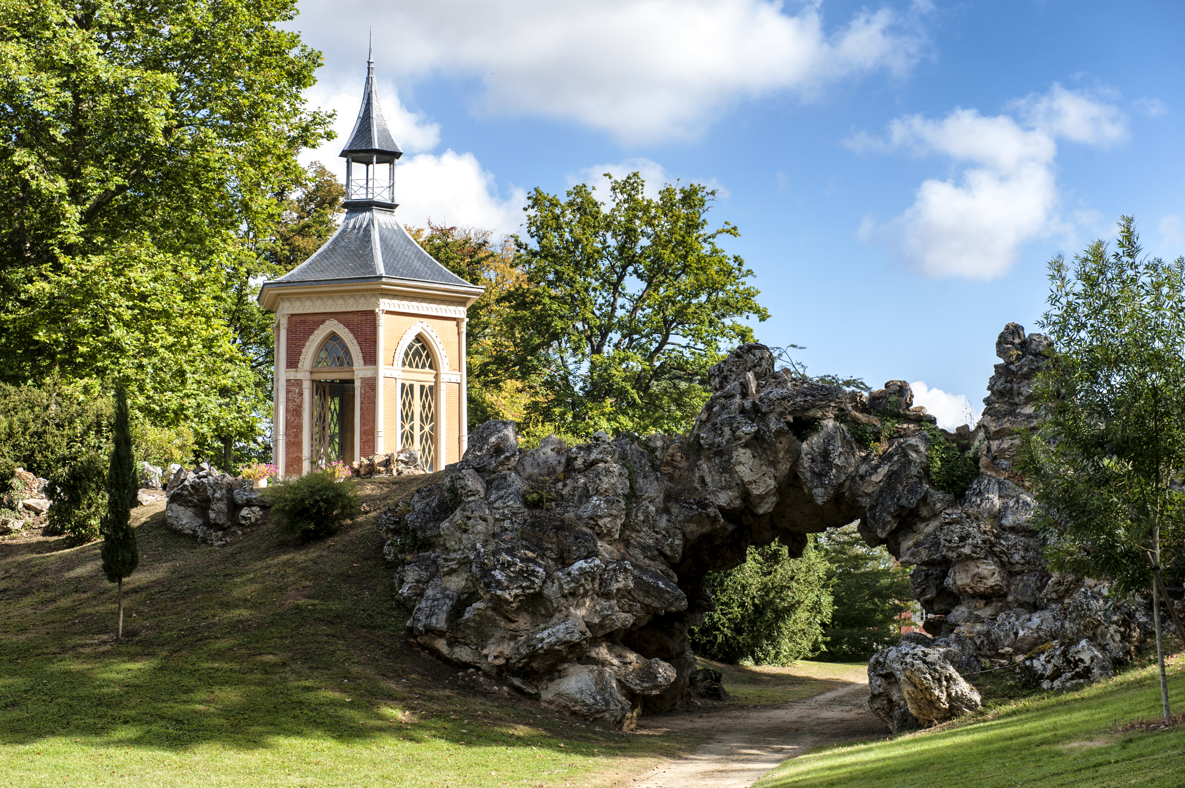 Château du Haut Rosay - fabrique